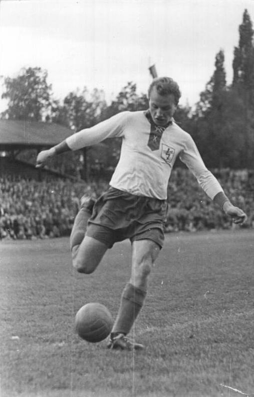 Zentralbild-TBD (Wlocka) Str-Ho. 24.9.1953 Freundschaftsspiel Turbine - Erfurt gegen Chemie Karl-Marx-Stadt im Erfurter Georg Dimitroff-Stadion - Am 13.9.1953 wurde im Erfurter Dimitroff-Stadion das Freundschaftsspiel Turbine Erfurt gegen Chemie Karl-Marx-Stadt ausgetragen, das mit 1:1 endete. UBz: Vorbildliche Haltung zeigte der Turbine Rechtsaußen Lothar Weise. Er schoss das einzige Tor für Turbine im Spiel gegen Chemie Karl-Marx-Stadt.